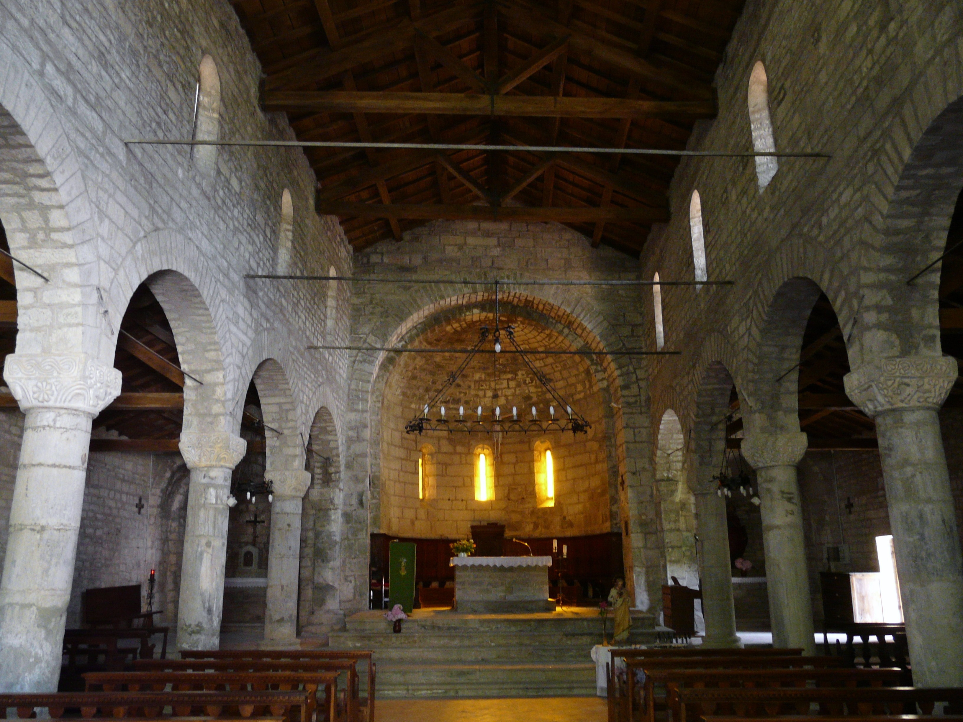 Navata centrale della pieve di San Paolo di Vendaso, Fivizzano, Toscana, Italia